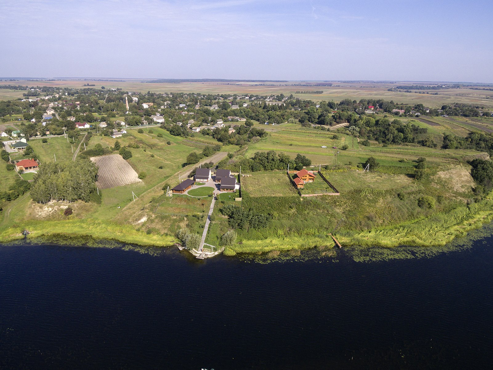 Зйомка з квадрокоптера